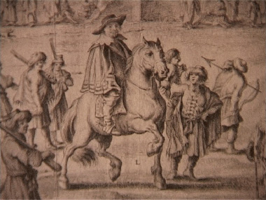 Detail of Antonius de Liedekerke view of Marrakesh 1640.